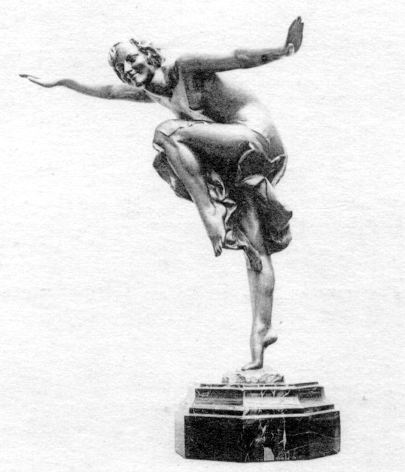 Statuette Danse folle par Eugène de Bremaecker.